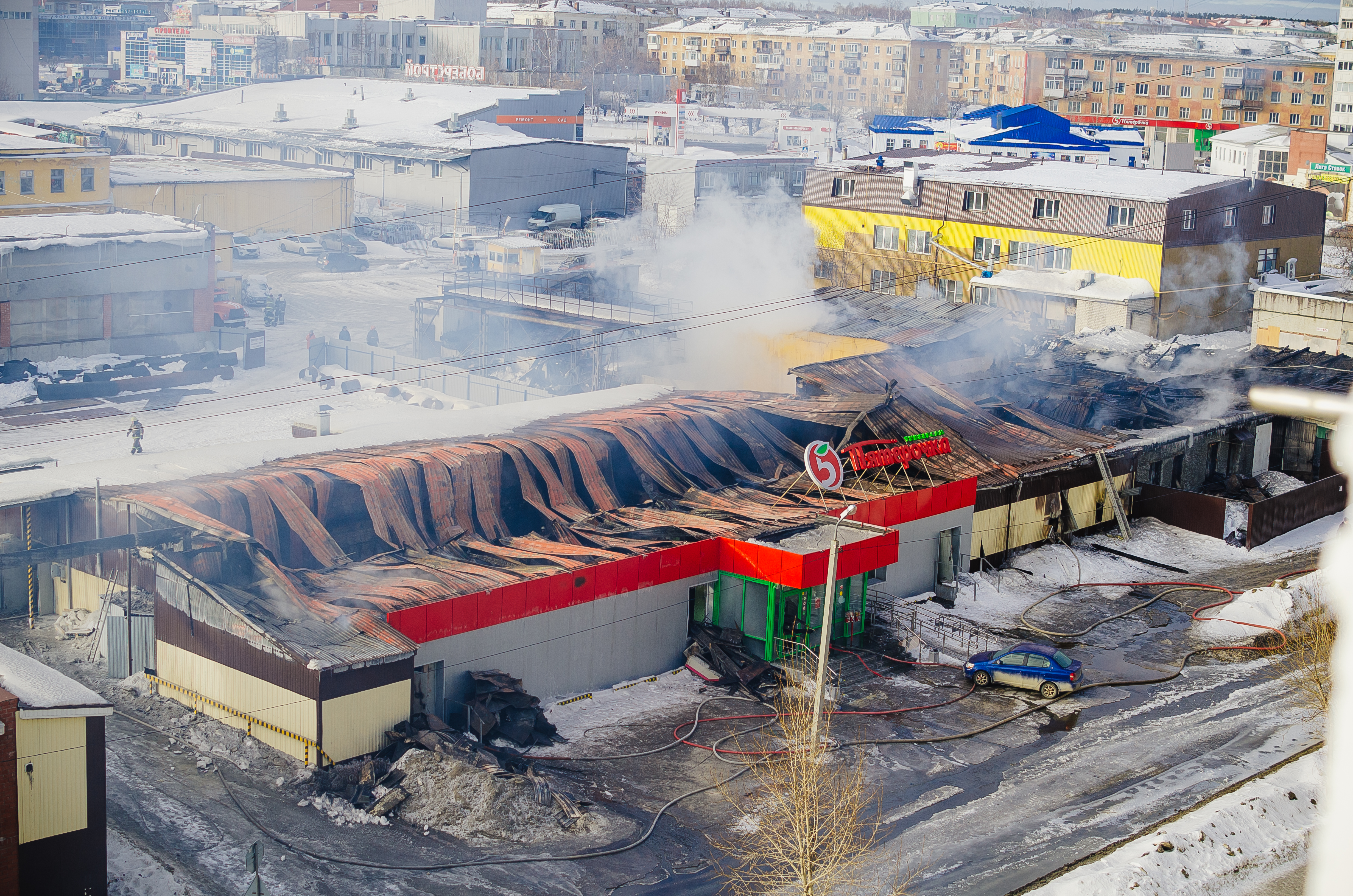 Горит магазин Пятёрочка по улице Строителей 1